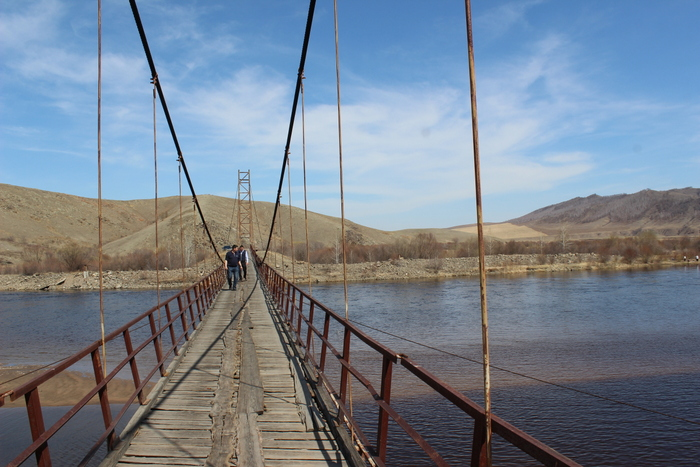 Висячий мост через реку Джида в окрестностях села Тохой. Бурятия, Джидинский район.